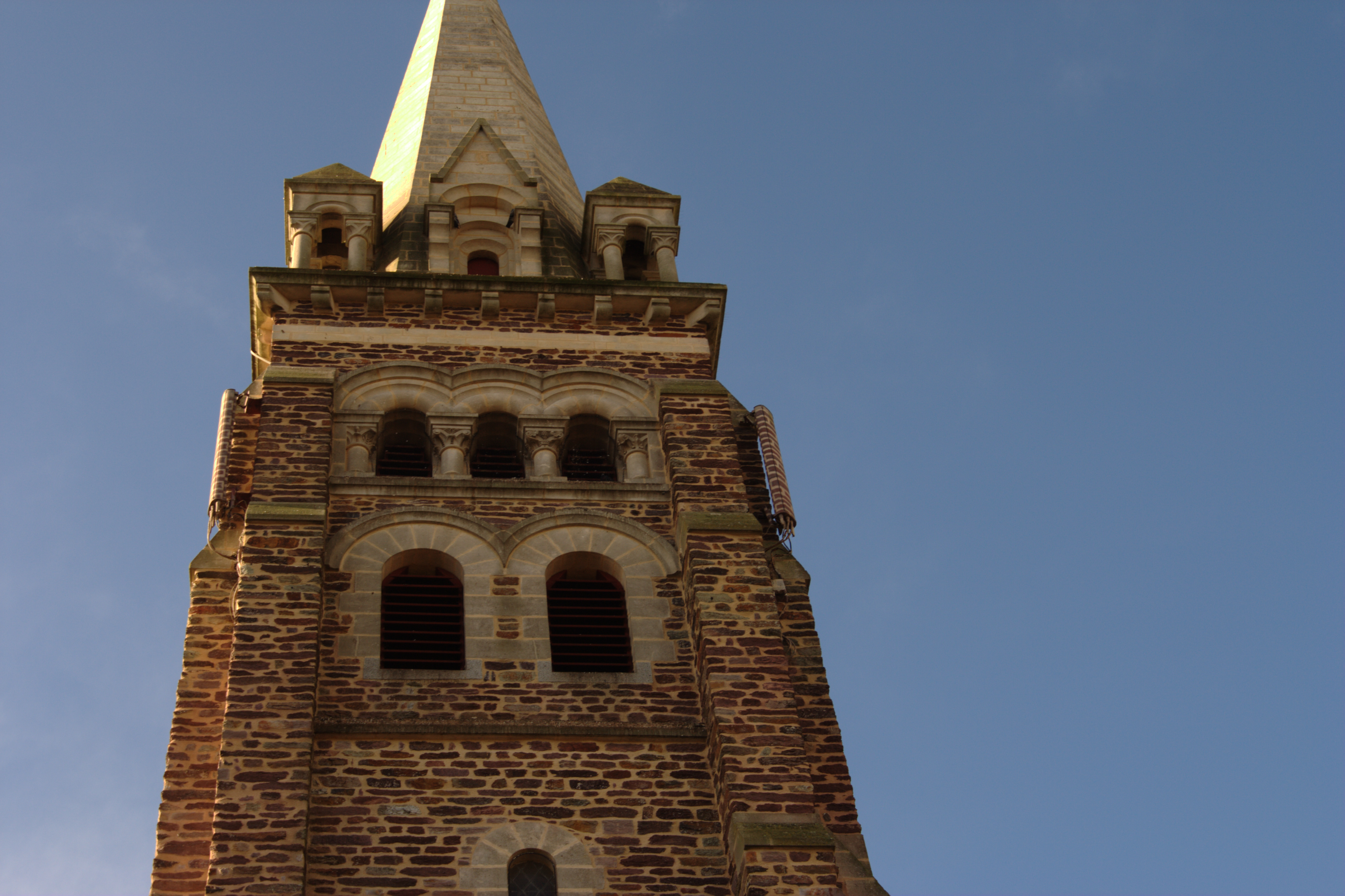 Église Saint-Joseph de La Chapelle-des-Fougeretz.